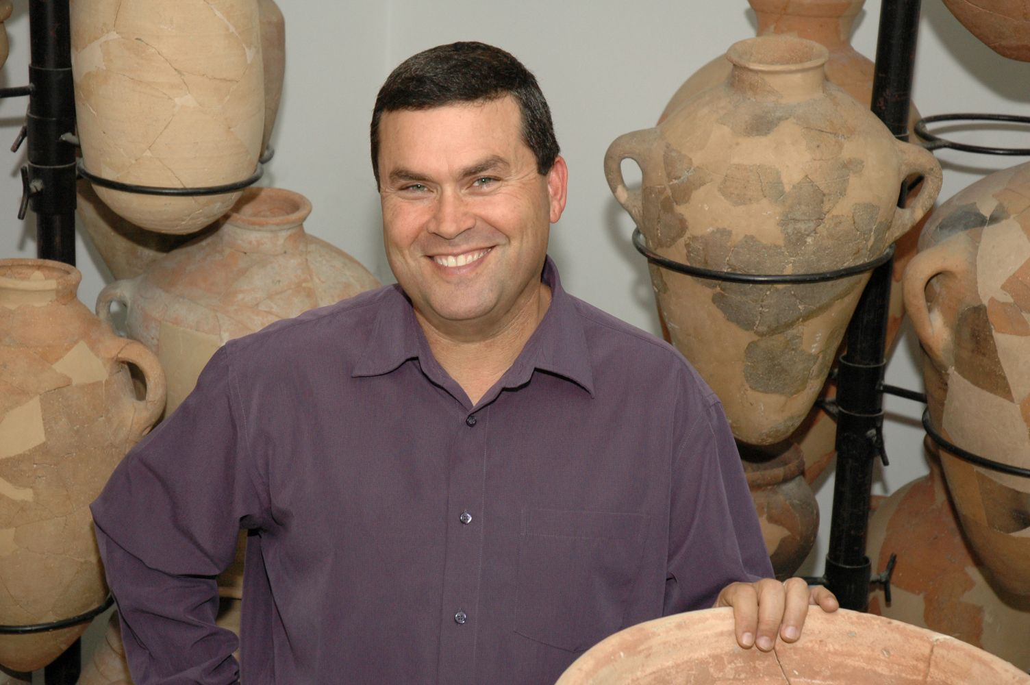 פרופ' ליפשיץ מהחוג לארכיאולוגיה באוניברסיטת תל אביב